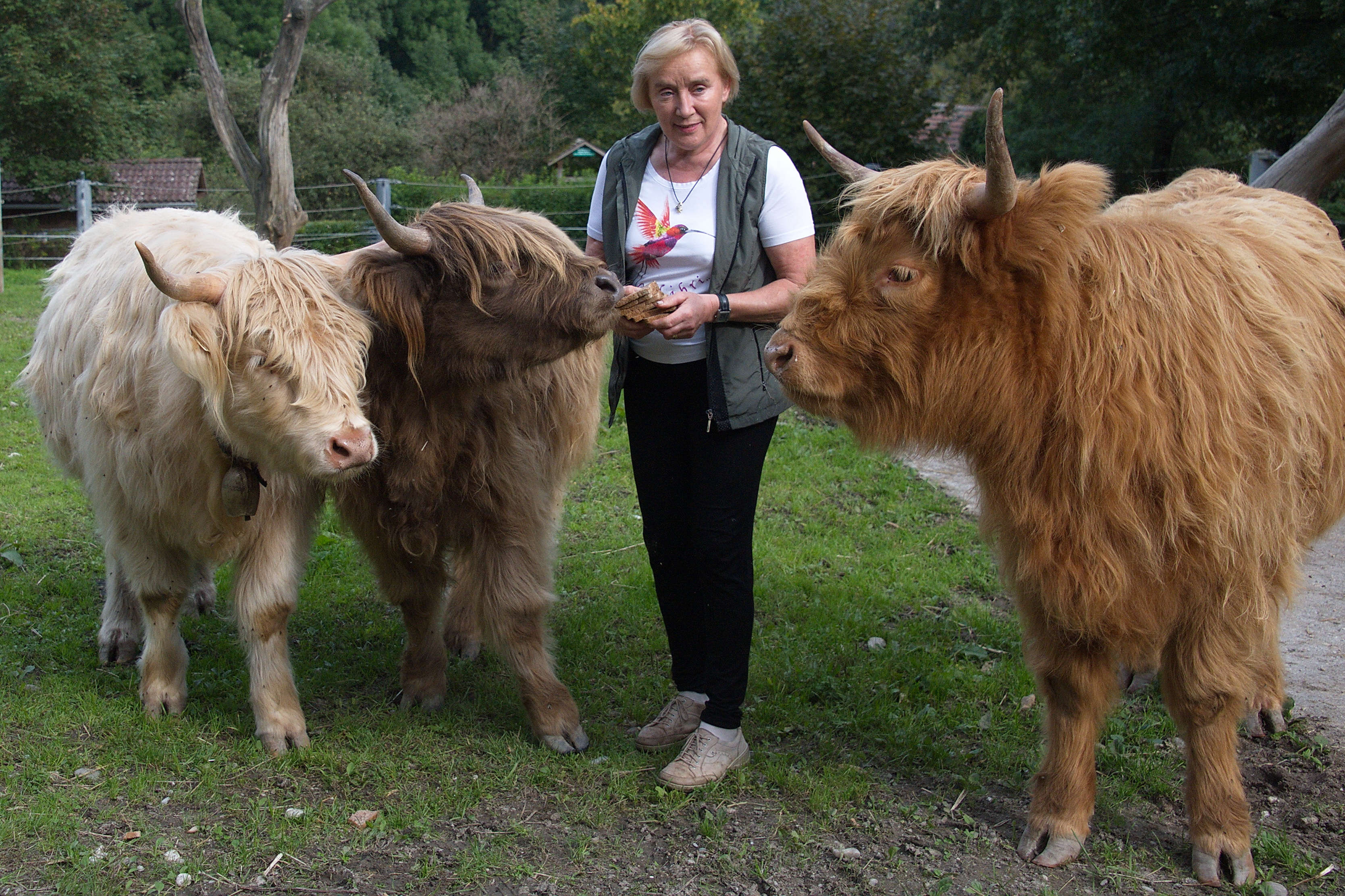 Tiergarten Walding 2